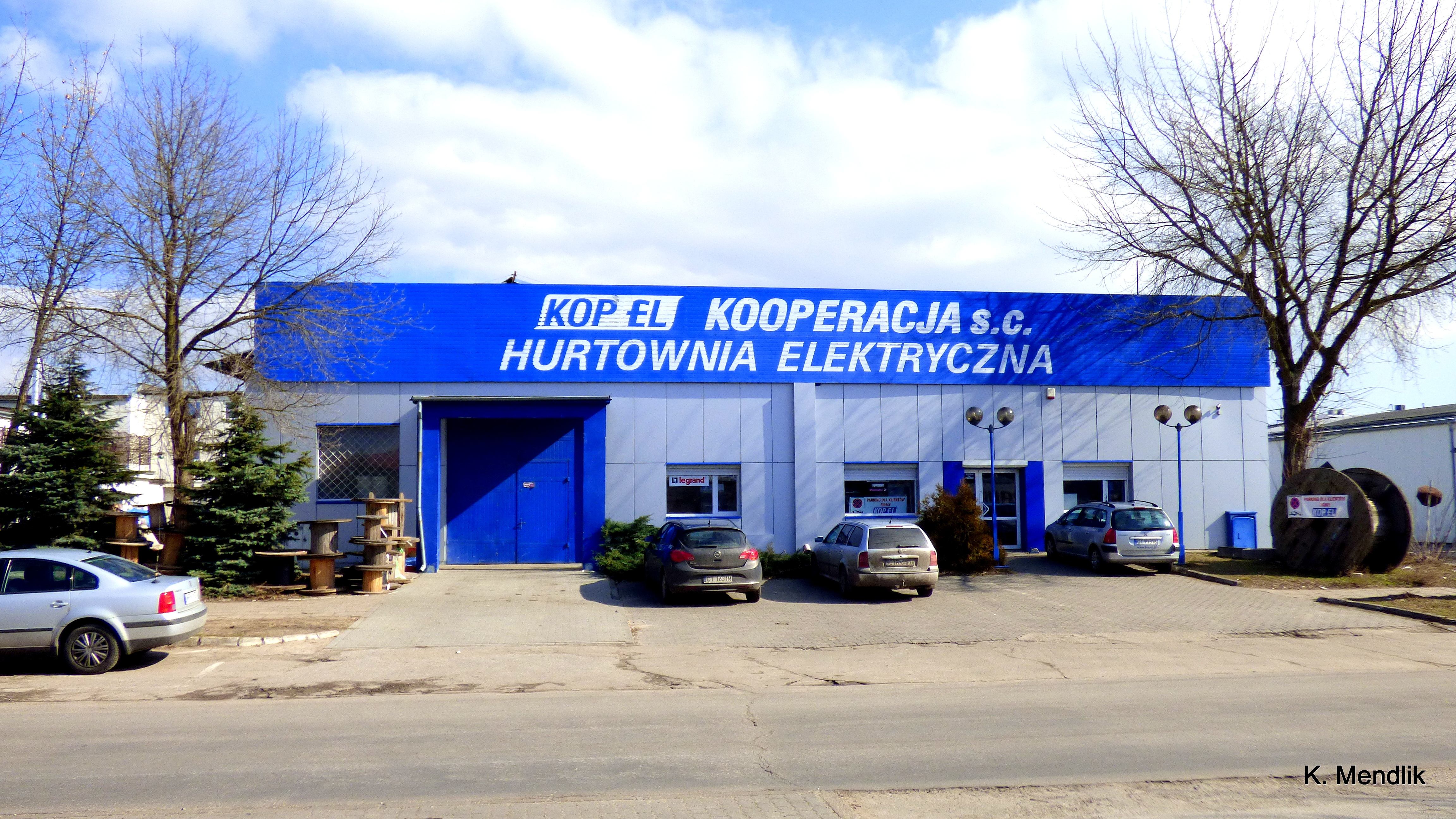 Hurtownia Elektryczna - Widok z ulicy Skandynawskiej w Bydgoszczy